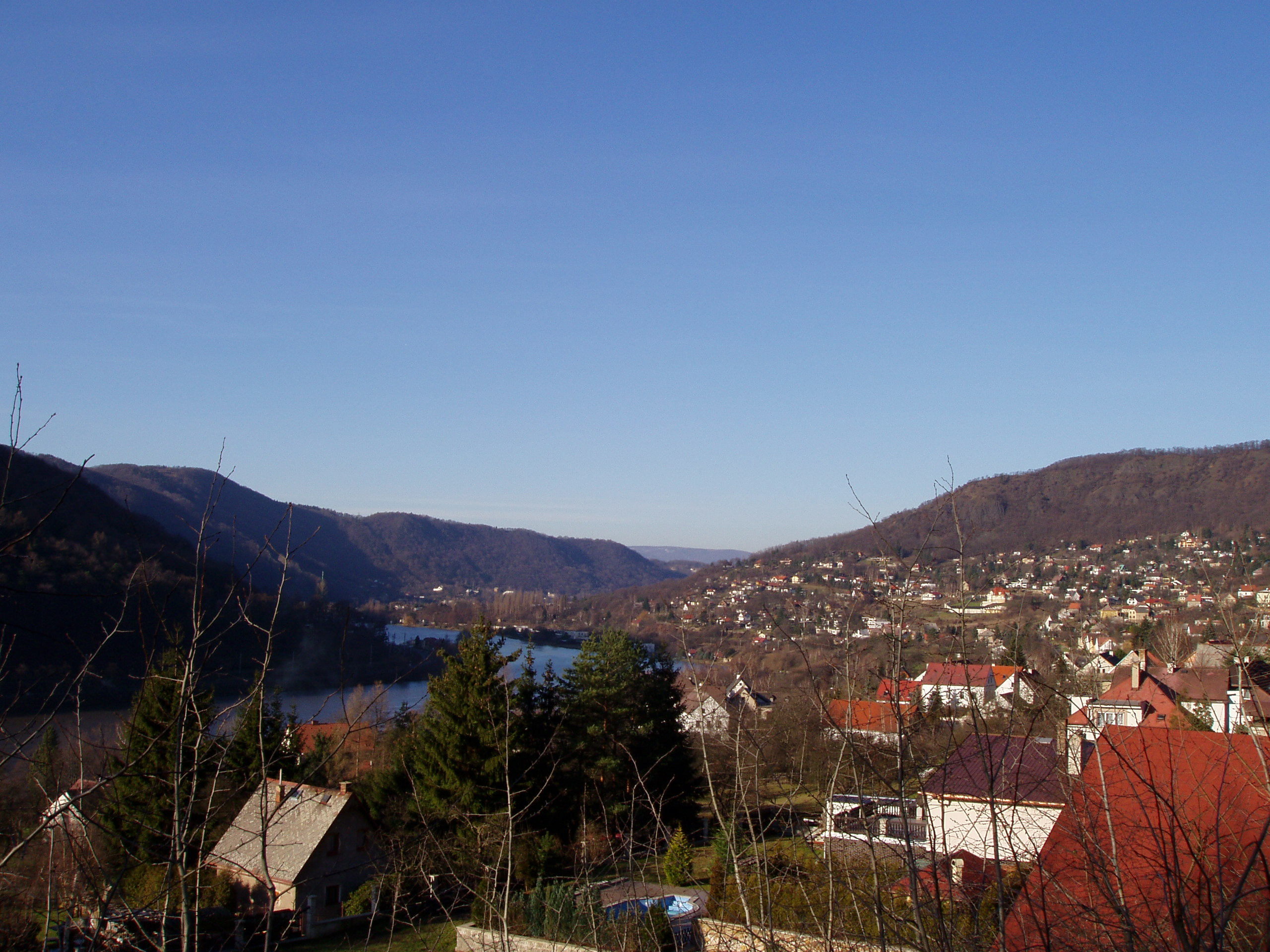 Pohled na Brnou nad Labem